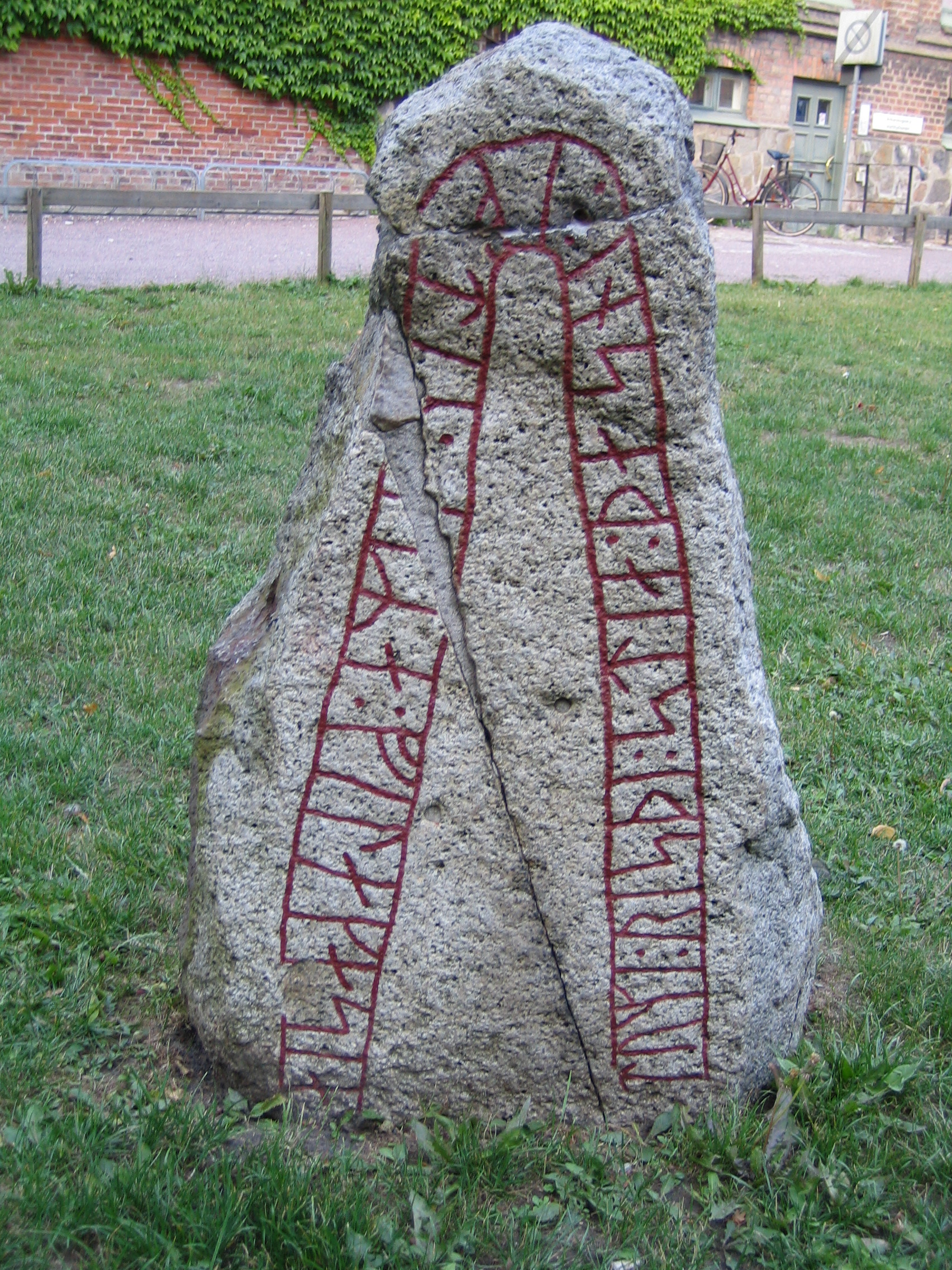 Skivarpsstenen, runstenskullen i Lundagård, signum DR 270.